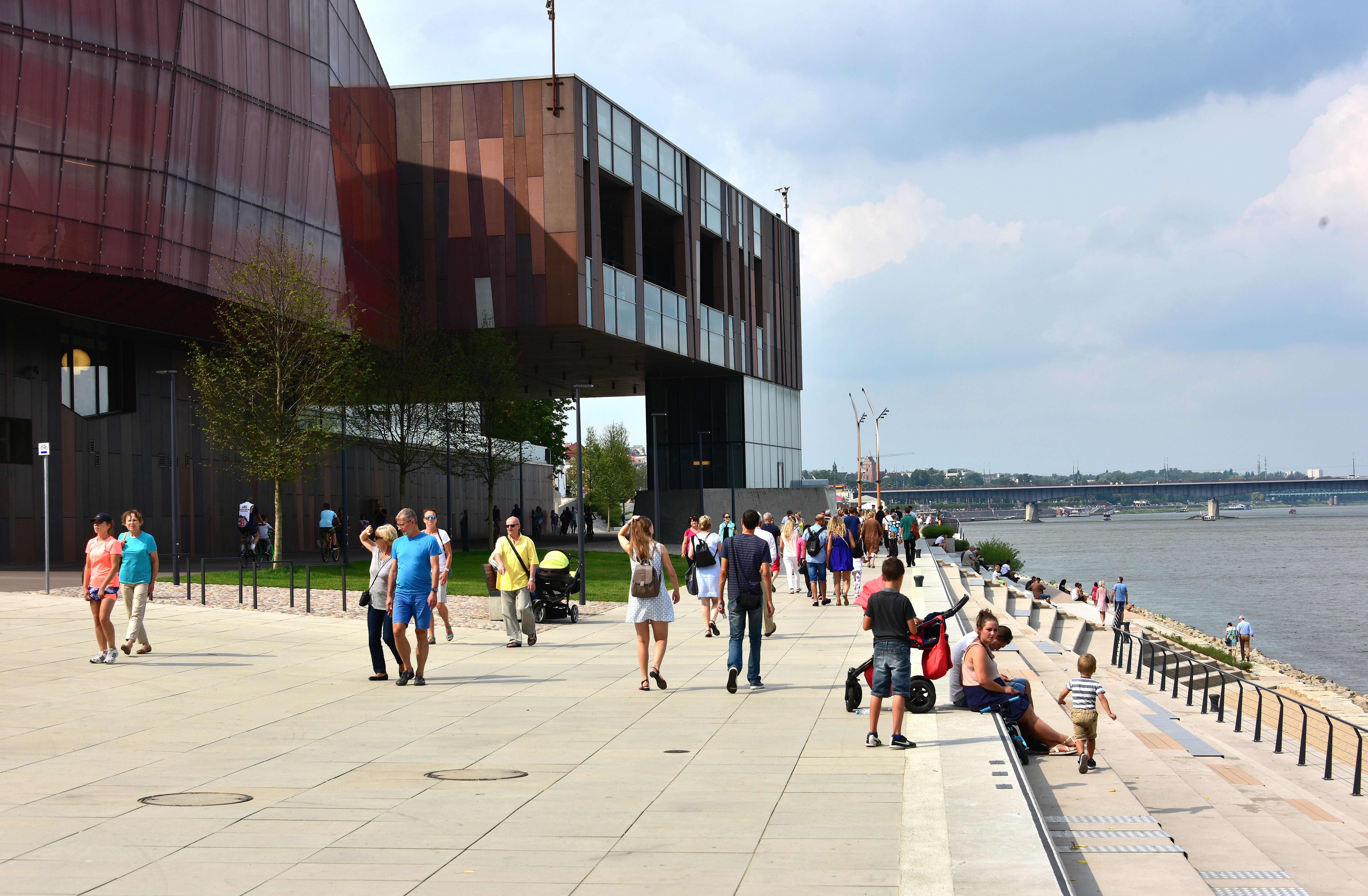 Bulwary wiślane w Warszawie przy Centrum Nauki Kopernik